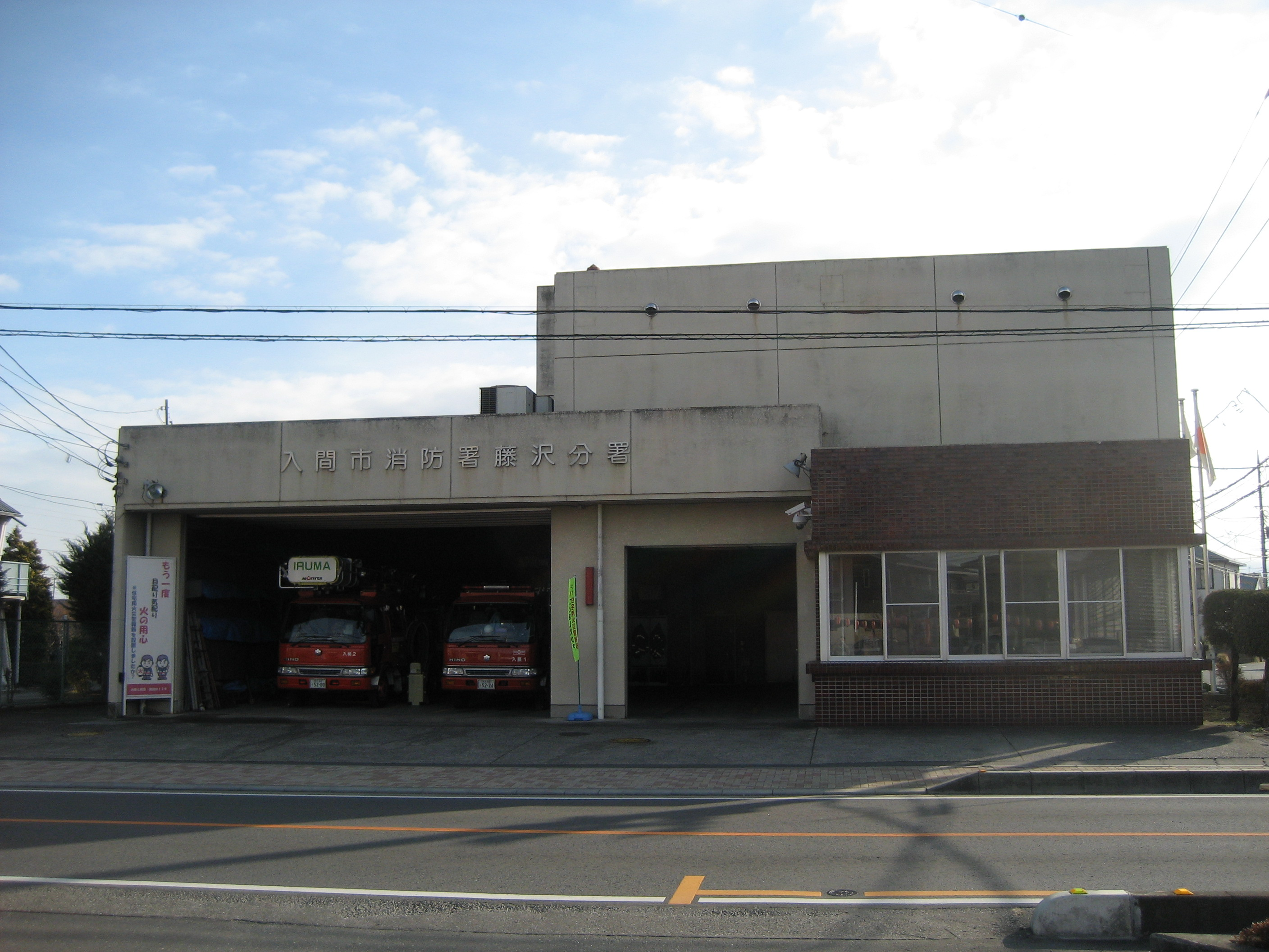 入間市消防本部藤沢分署庁舎